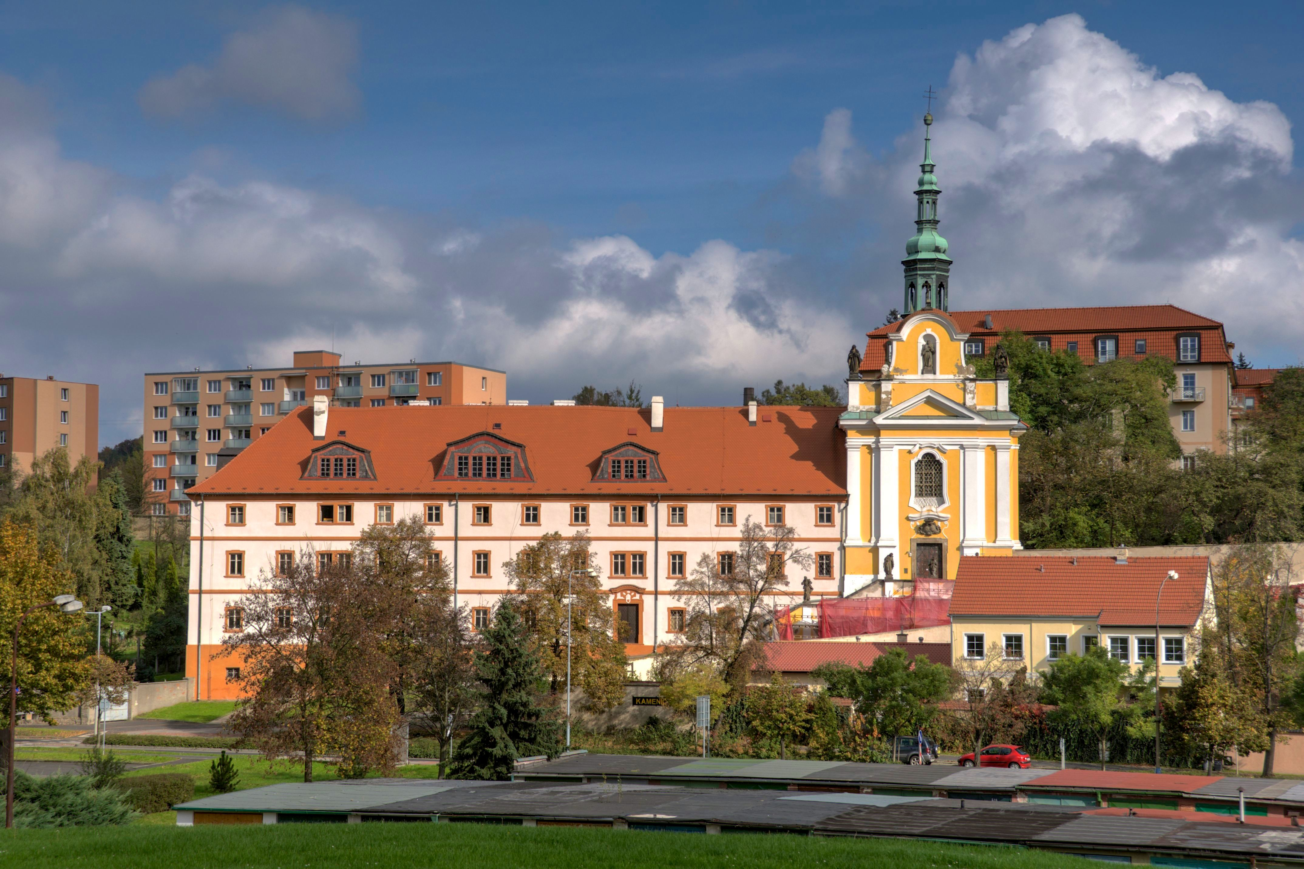 Klášter alžbětinek s kostelem Svaté rodiny, Rokelská 234, Kadaň.